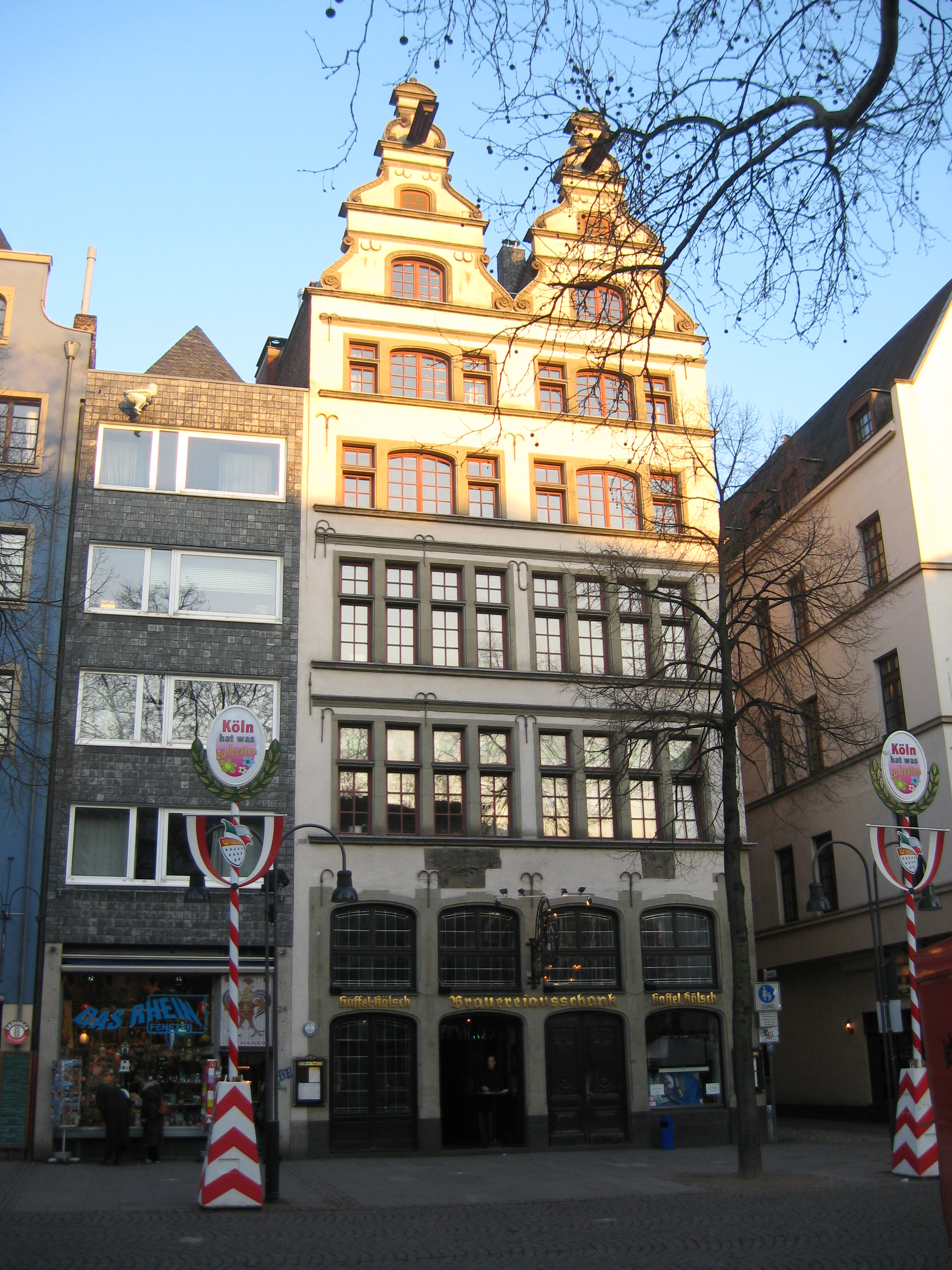 Brauhaus Gaffel, Frontansicht, Köln (Alter Markt)